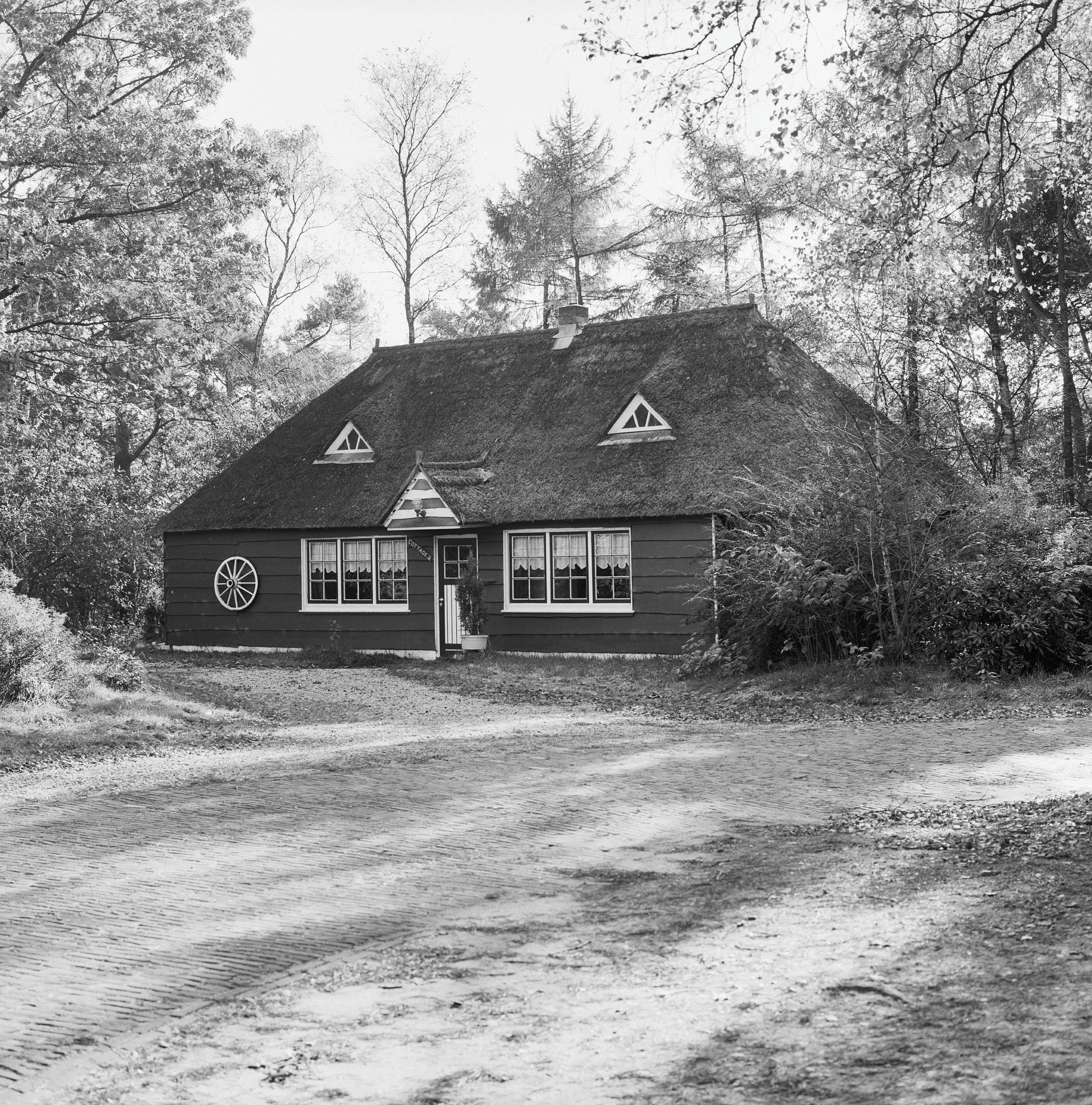 Hotel-restaurant In den Swarten Ruijter: Overzicht voorgevel houten logeergelegenheid, cottage 3 (opmerking: Gefotografeerd voor Monumenten In Nederland Overijssel, bladzijde 181)